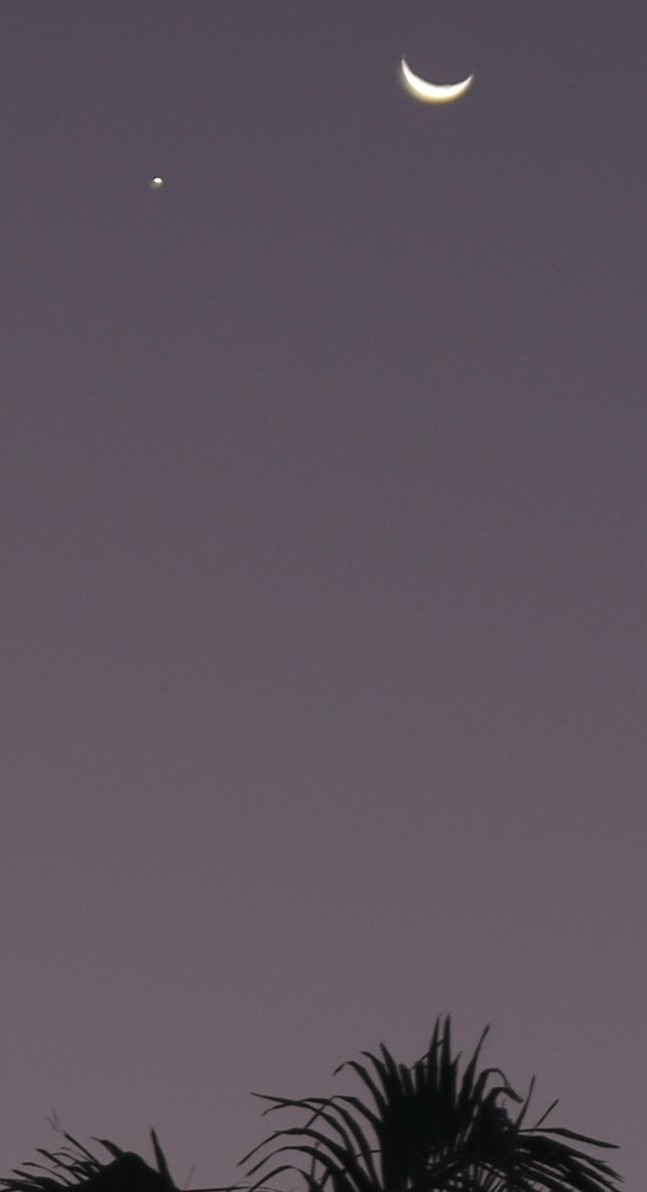 Quartier de lune croissante hémisphère sud Mission Beach Australie le 16 juillet 2018